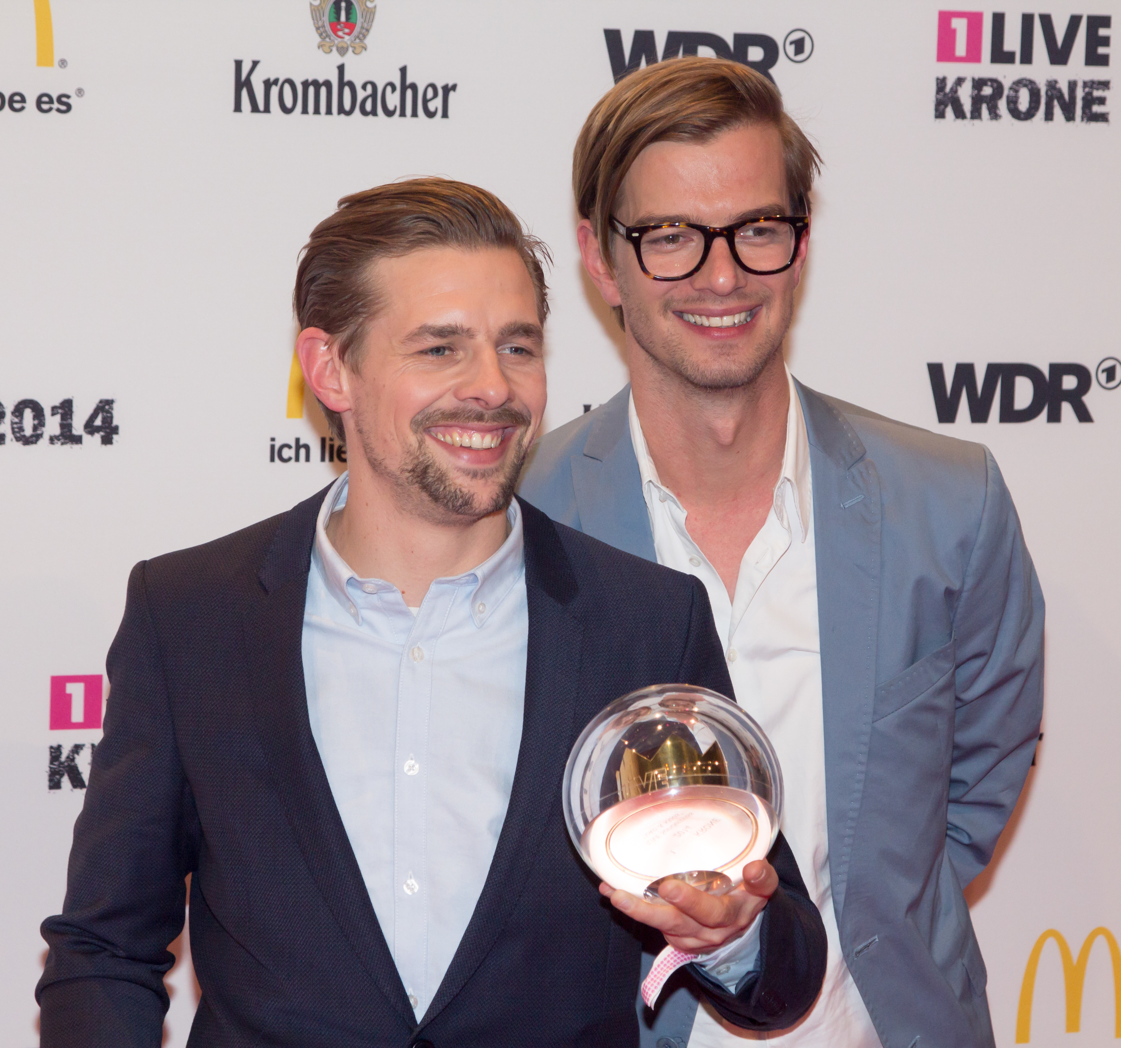 1LIVE Krone 2014 in der Bochumer Jahrhunderthalle: Sonderpreis: Joko Winterscheidt und Klaas Heufer-Umlauf